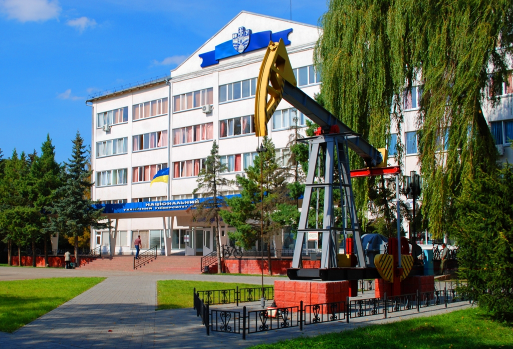 Офіційне фото ІФНТУНГ